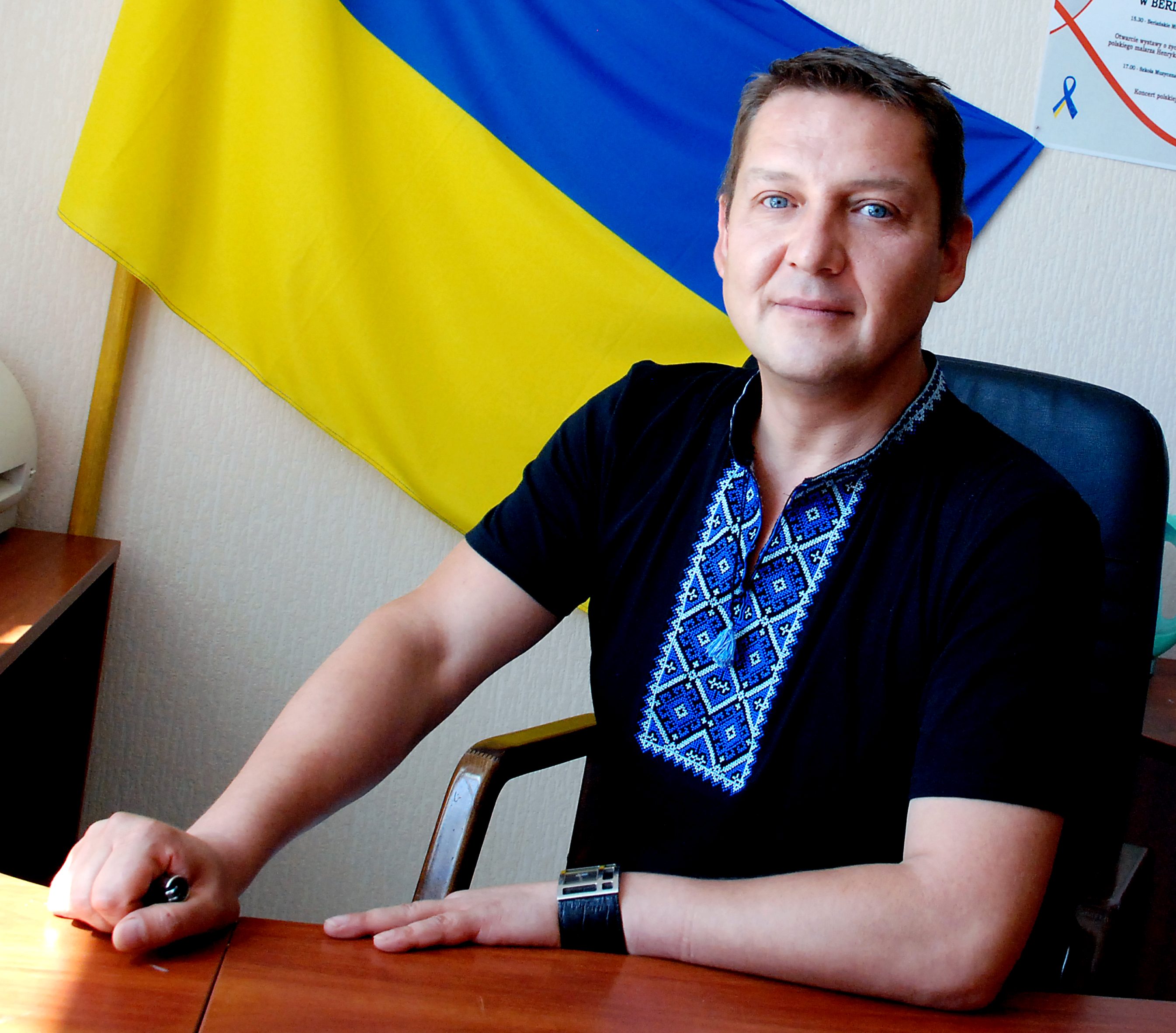 Сухомлинов Олексій Миколайович